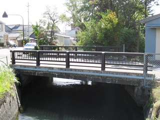 十郷橋 福井県坂井市坂井町